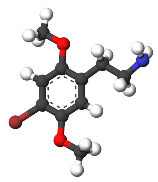 w:2C-B